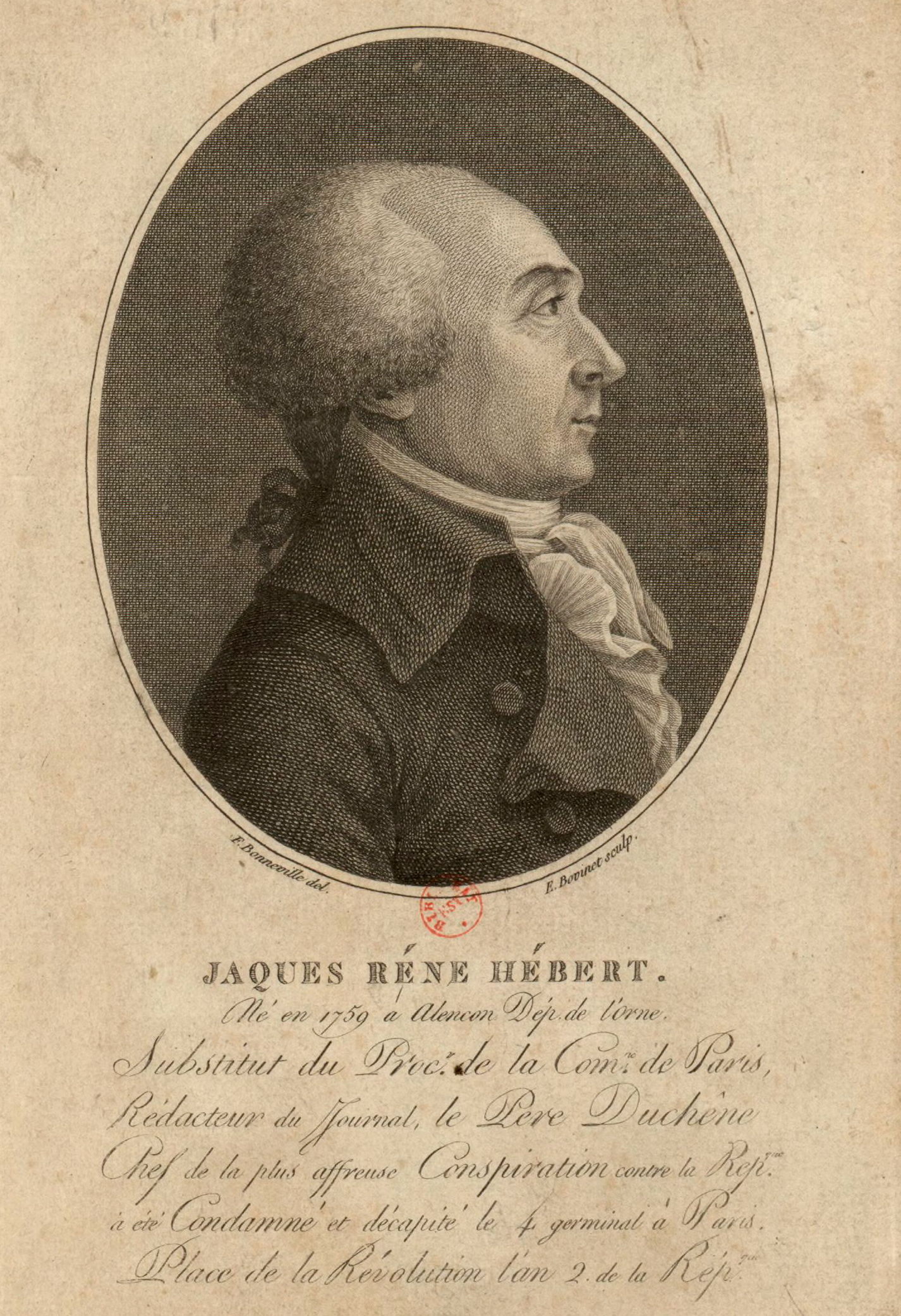 Portrait de profil de Jacques-René Hébert, gravé par Edme Bovinet d'après un dessin de François Bonneville.